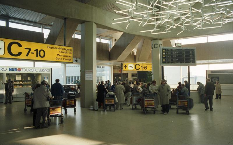 10.2.1989 Flughafen Köln/Bonn, Reiseverkehr